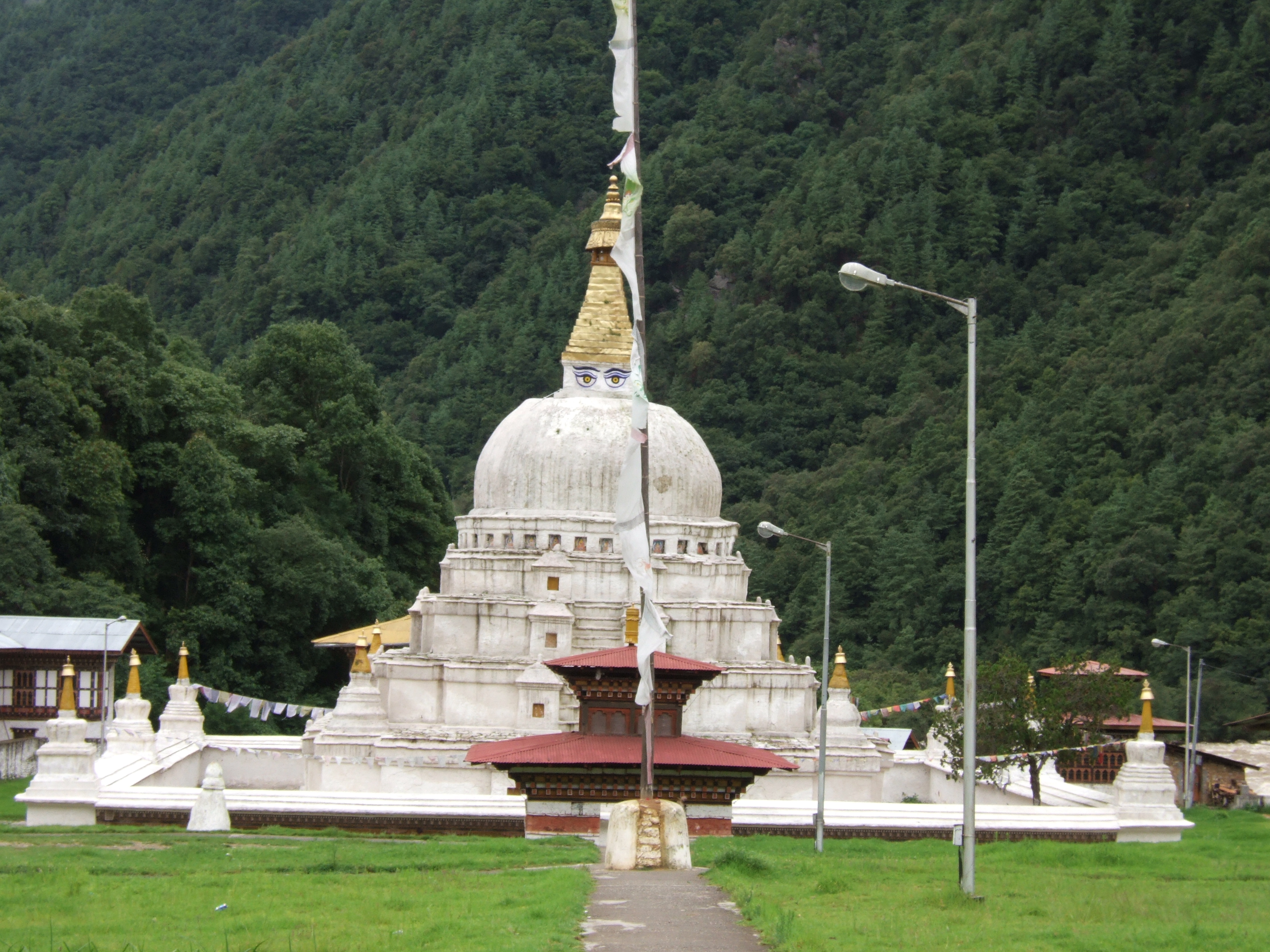 Chorten Khora Stupa, Trashi Yangtse, Bhutan